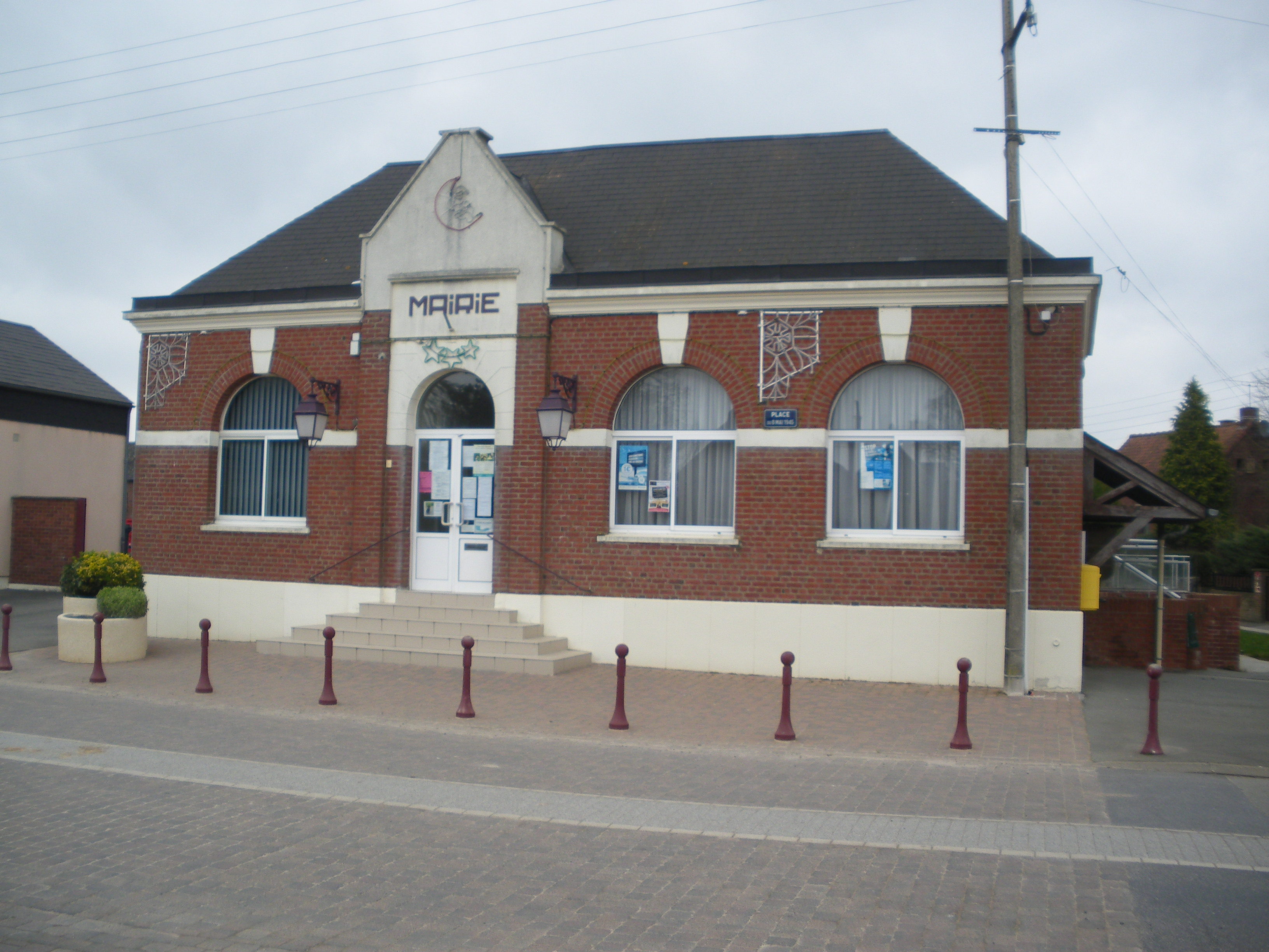 Vue de la mairie de Graincourt-lès-Havrincourt.